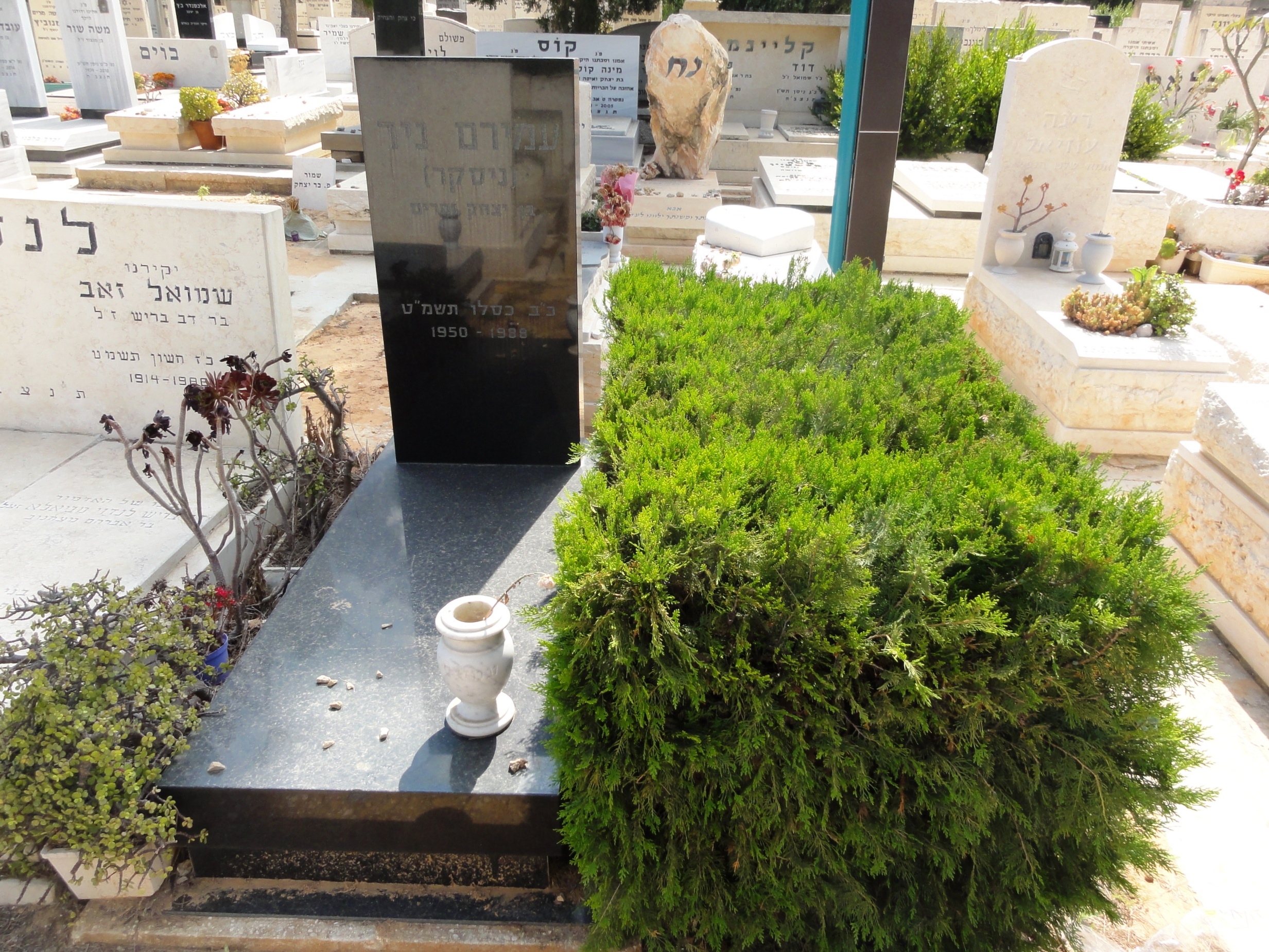 קברו של עמירם ניר